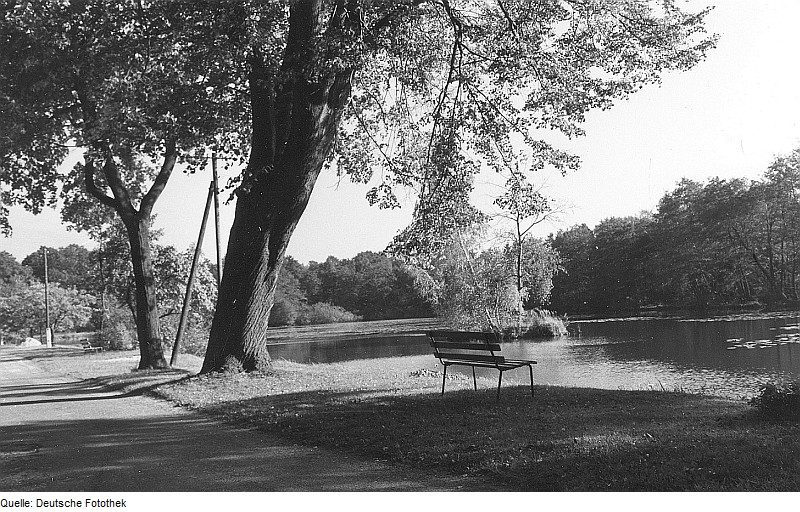 Original image description from the Deutsche FotothekTeicha bei Rietschen. Mühlteich